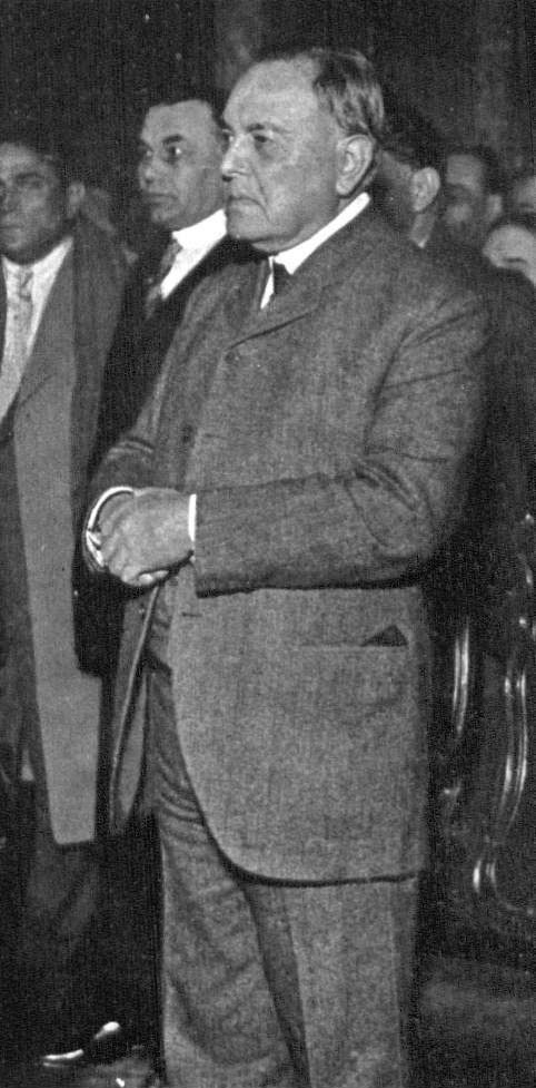 El dirigente argentino Hipólito Yrigoyen.